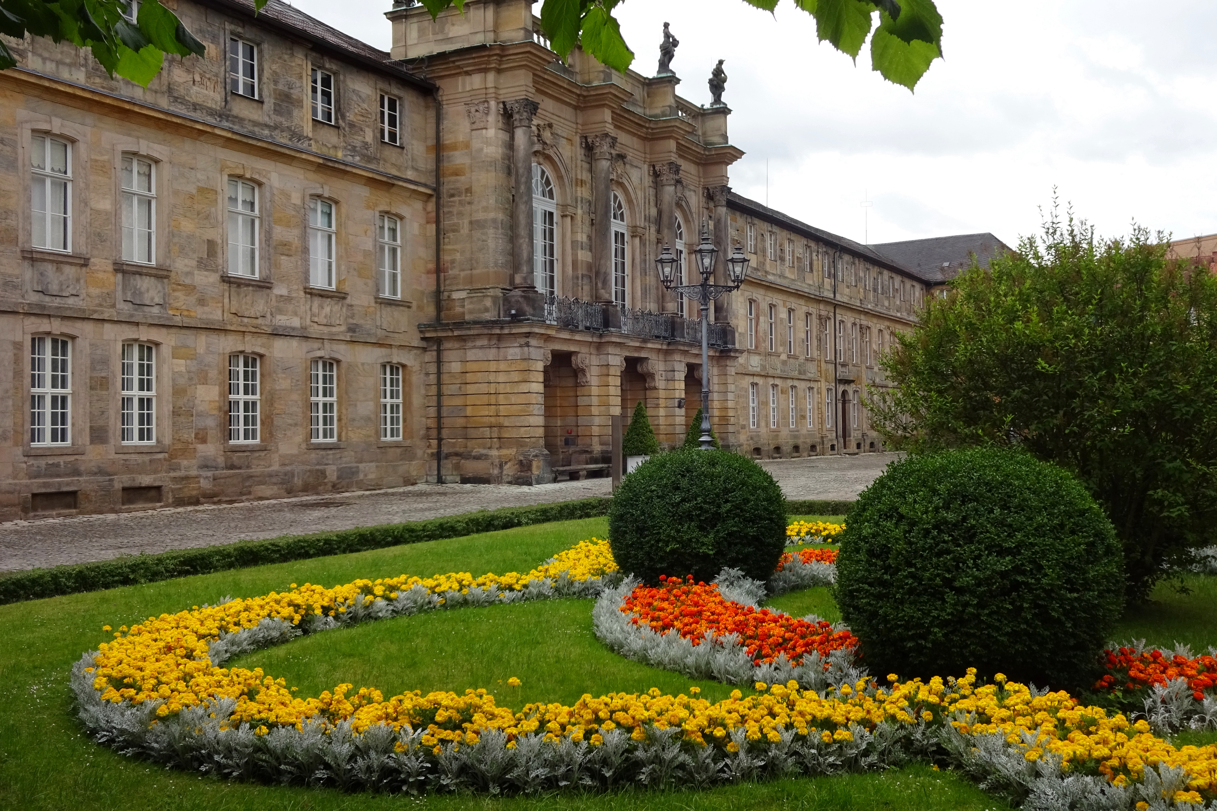 Bayreuth, Neues Schloss, Eingang, WestseiteThis is a photograph of an architectural monument.